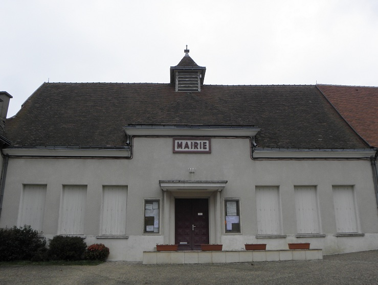 Mairie du Montet (03).